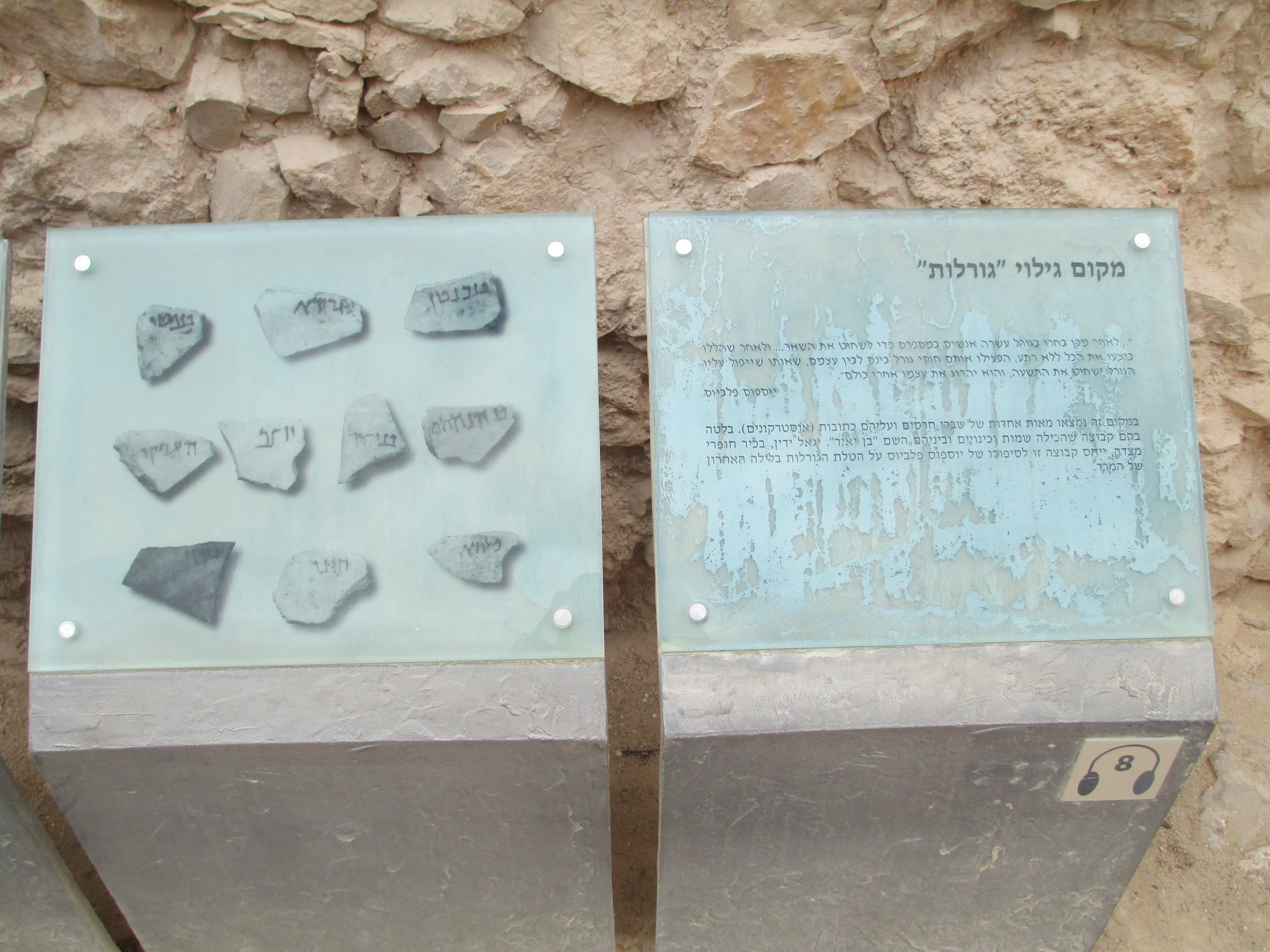 מקום מציאת אוסטרקוני הגורלות במצדה